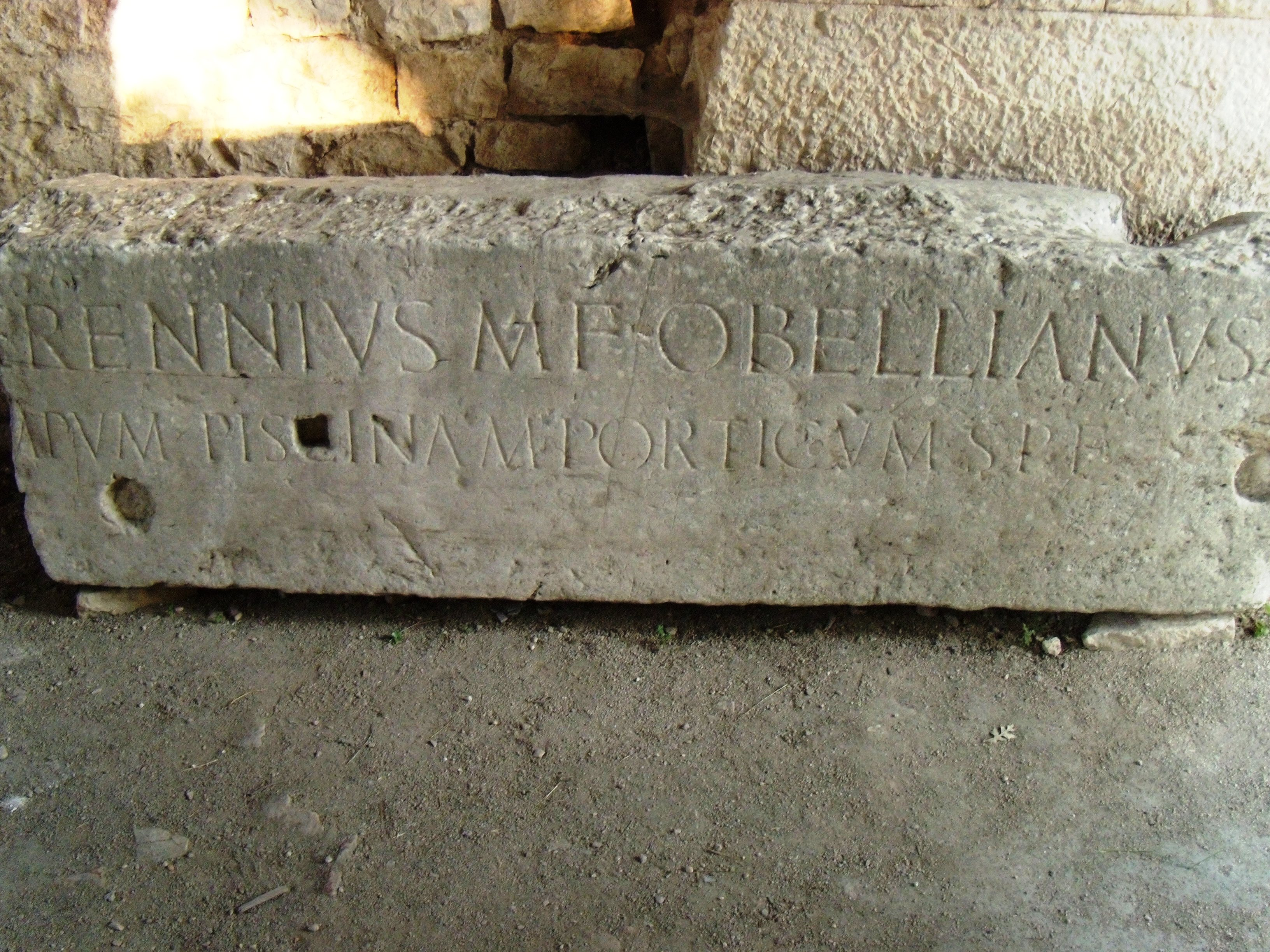 Scavi archeologici di Saepinum (Italy): epigrafe di epoca romana. AE 1981, 281: [- H]erennius M(arci) f(ilius) Obellianus / [ca]mpum piscinam porticum s(ua) p(ecunia) f(ecit)